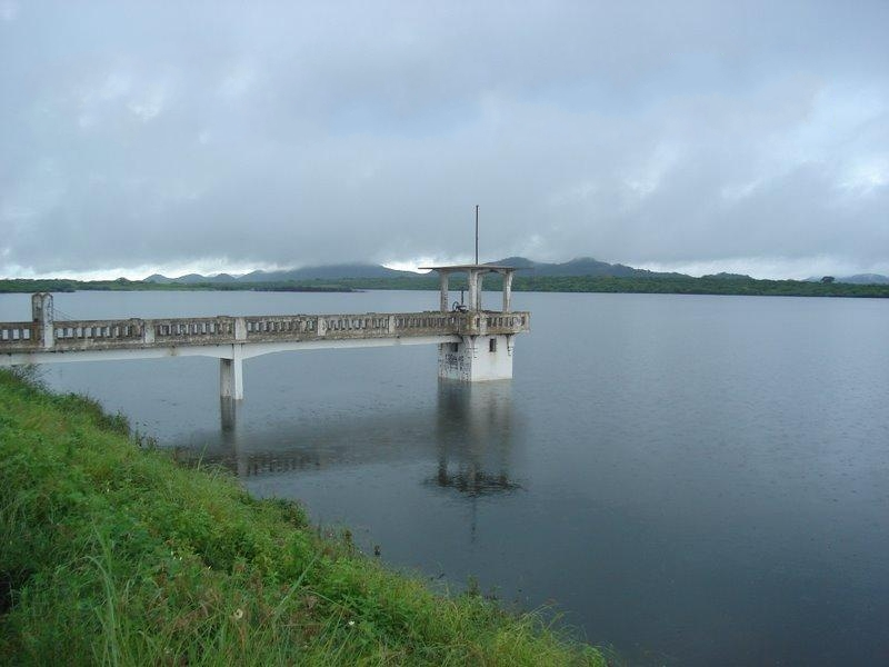 GALERIA DO AÇUDE DE CONDADO-PB